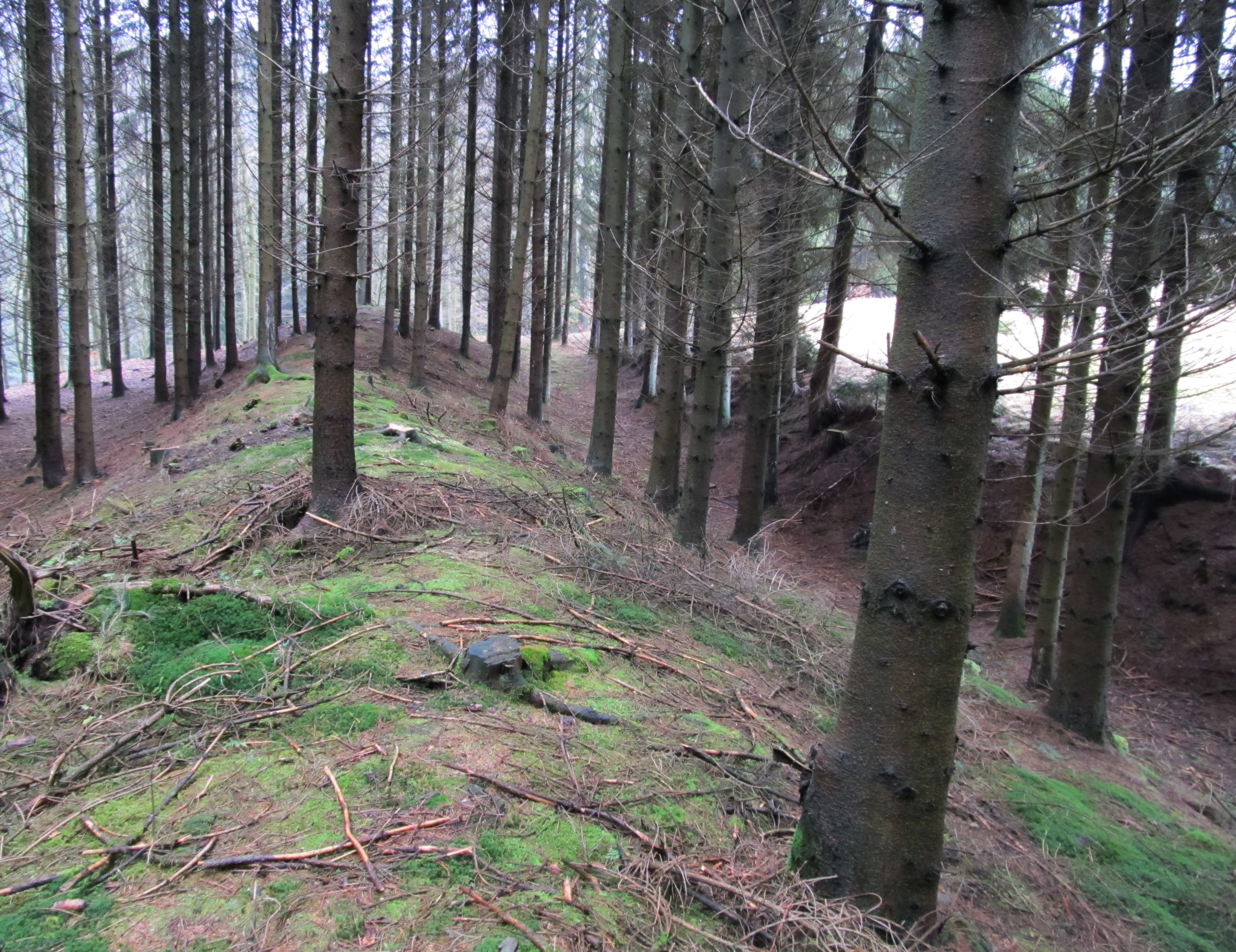 Wallburg Kirchilpe (Blickrichtung Ost), Schmallenberg, Germany.